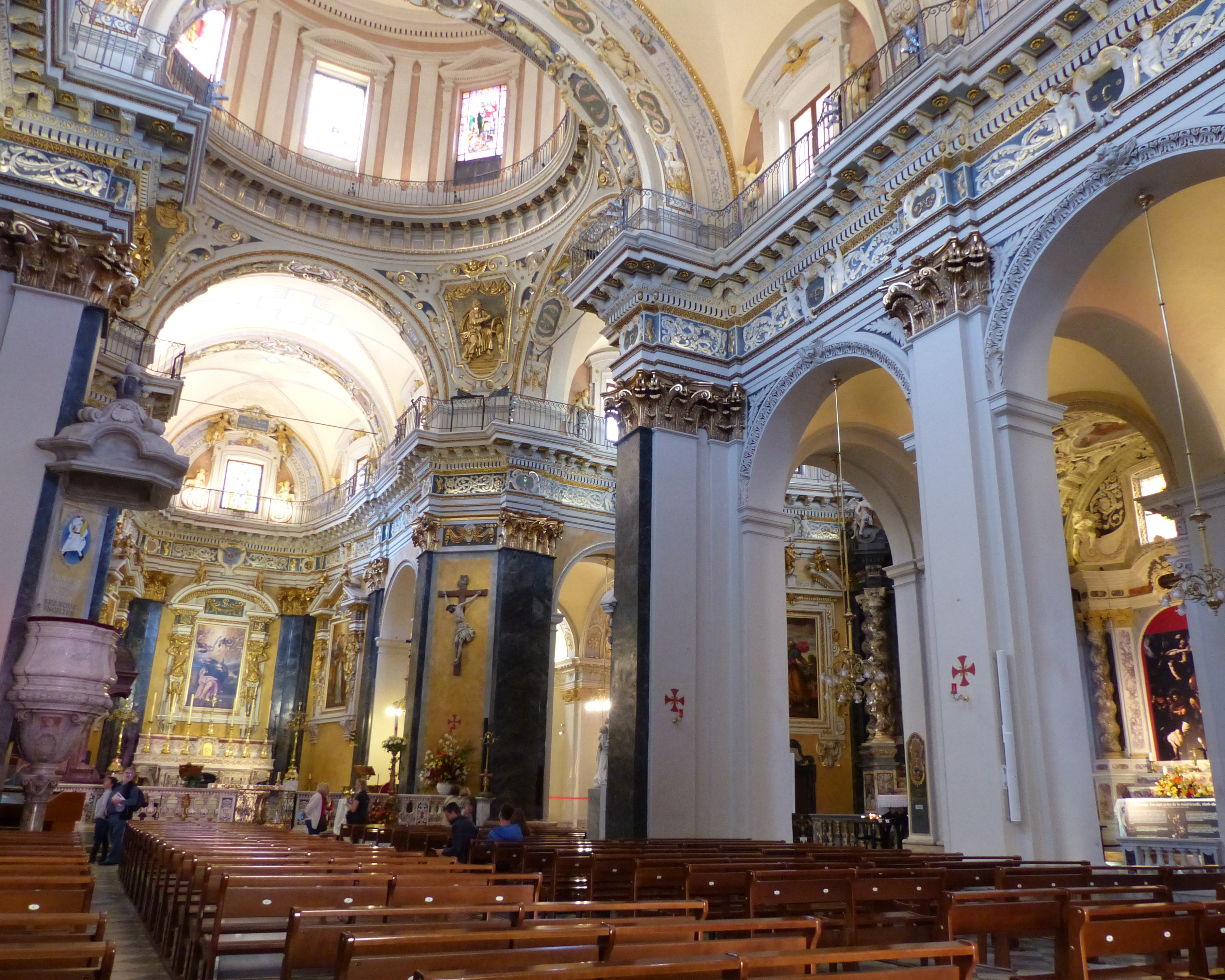 Nice (Alpes-Maritimes, France), cathédrale Ste Réparate, croisée du transept avec, au fond, l'abside du chœur, et bras nord du transept.